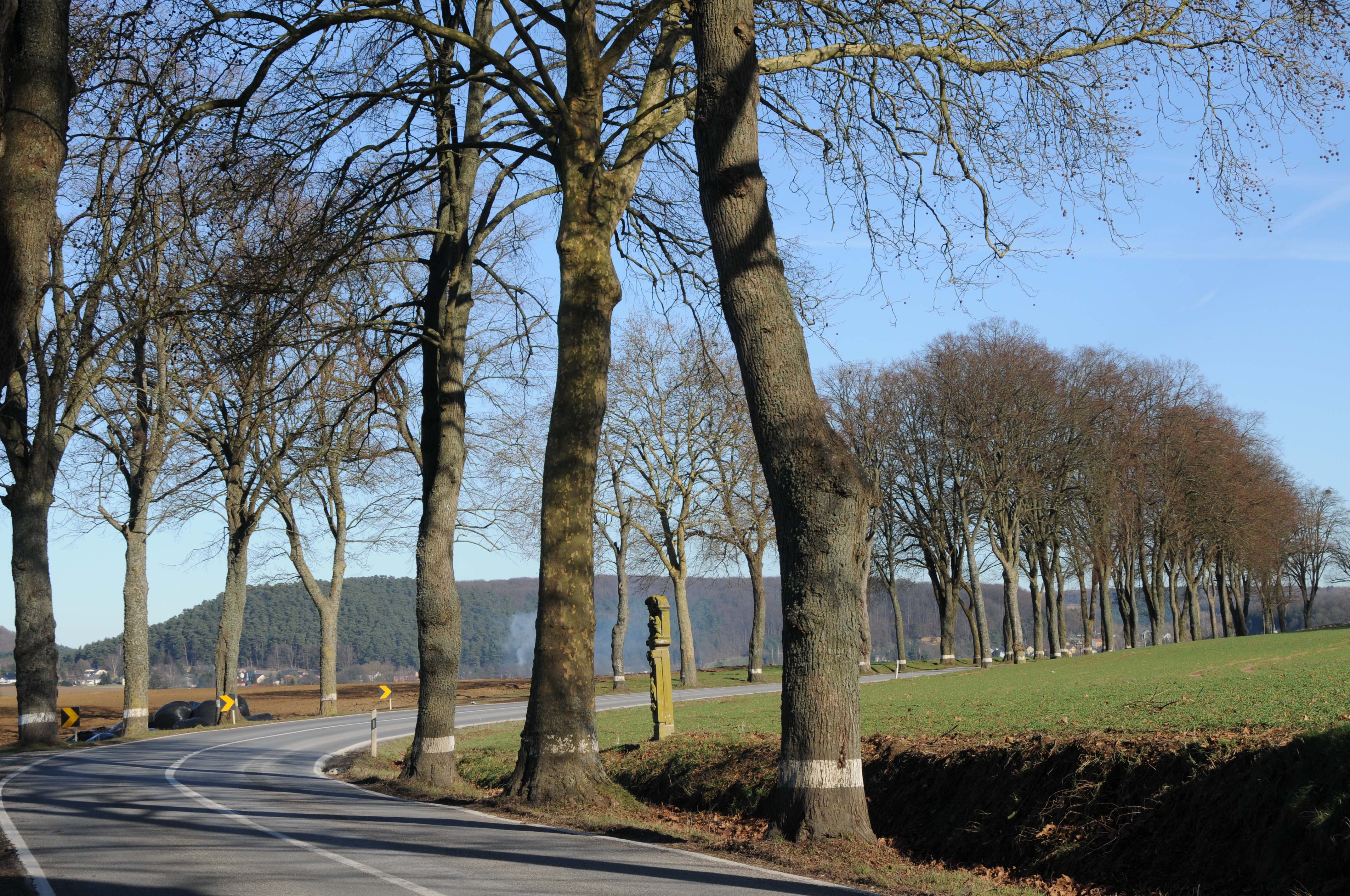 Allé ved Bruch ved Sëll.